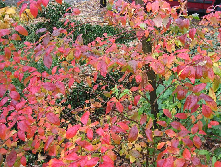 zelfgemaakte foto van Blauwe bes in herfstkleur: eind oktober